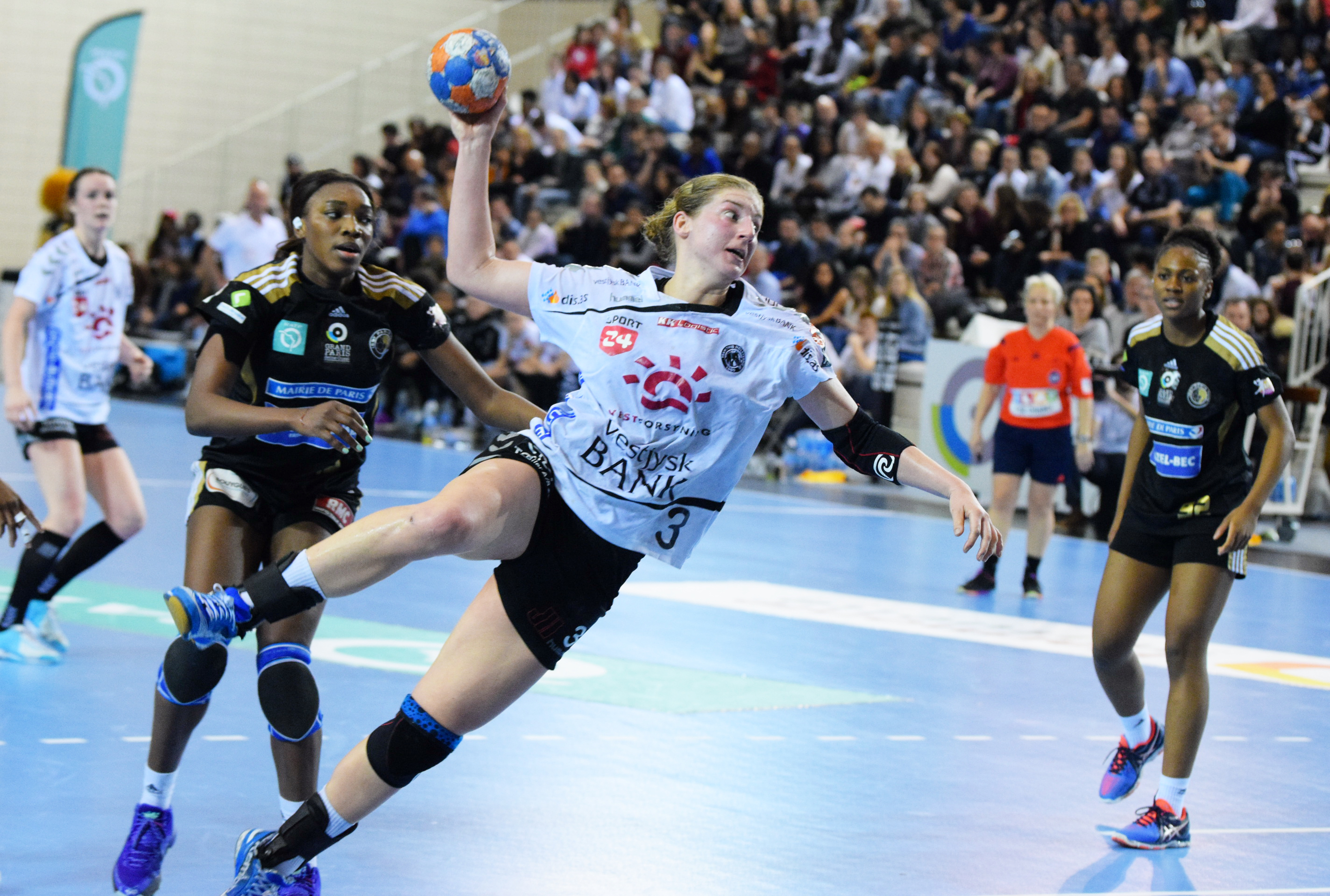 Linn Blohm Le 03 avril 2016 lors du match aller de demi-finale de la Coupe des vainqueurs de coupe de handball Issy Paris Hand / Team Tvis Holstebro